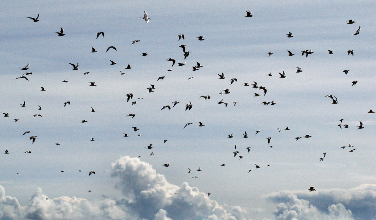 En fågelflock med måsfåglar.